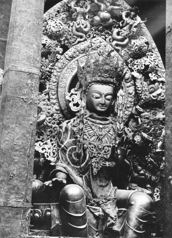 Tibetexpedition, Statue im Stadttempel in Lhasa Lhasa, Götterfigur im Stadttempel [Tschamba (Maitrea) im Vorhof des Tsuglhakangs in Lhasa, Maitreya, Byams-pa, Jamba]